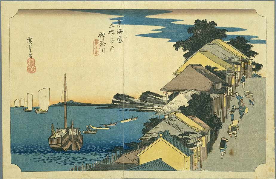 Kanagawa on the Tokaido, ukiyo-e prints by